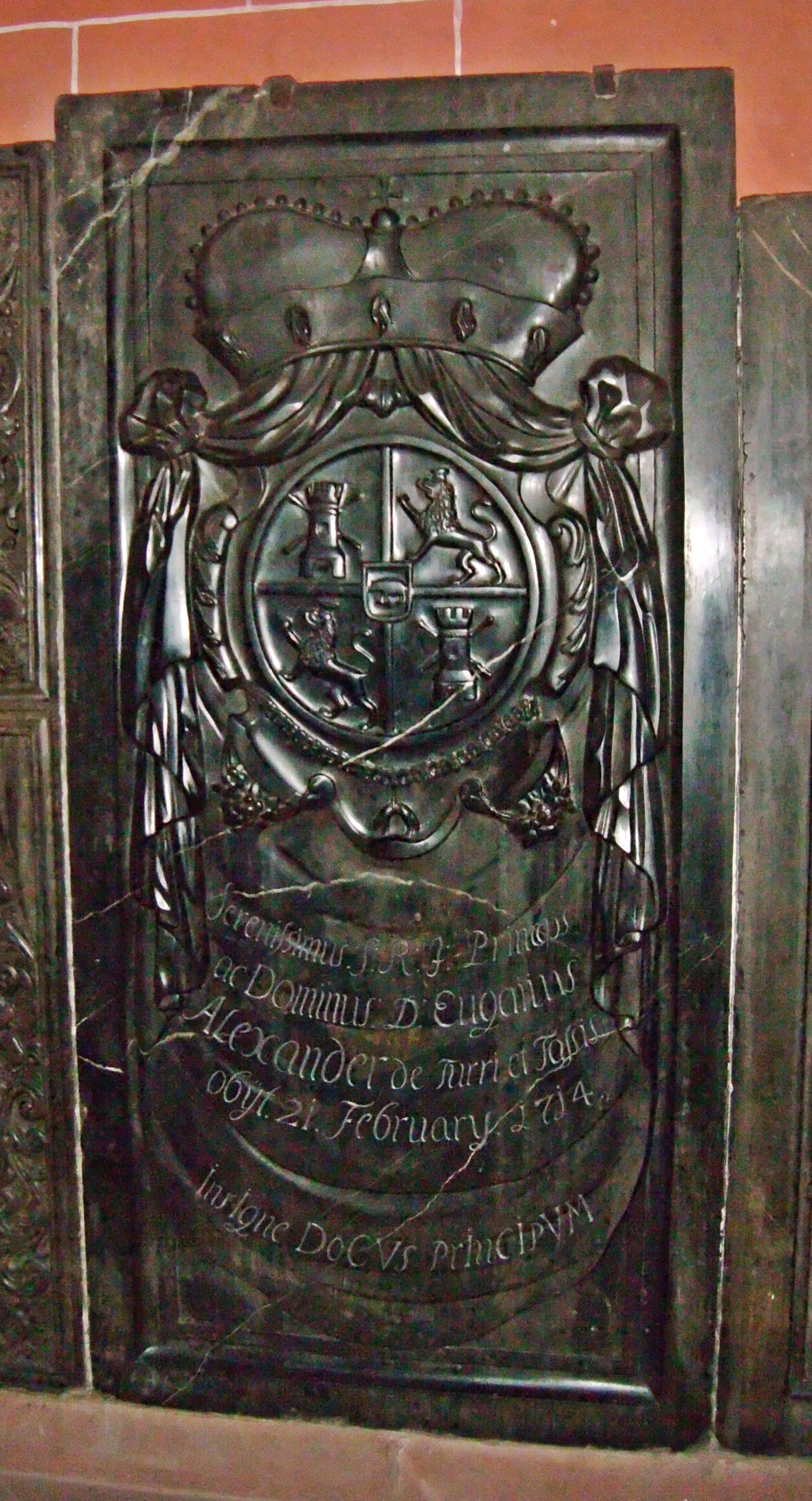 Grabstein Eugen Alexander von Thurn und Taxis (1652-1714) Dom zu Frankfurt